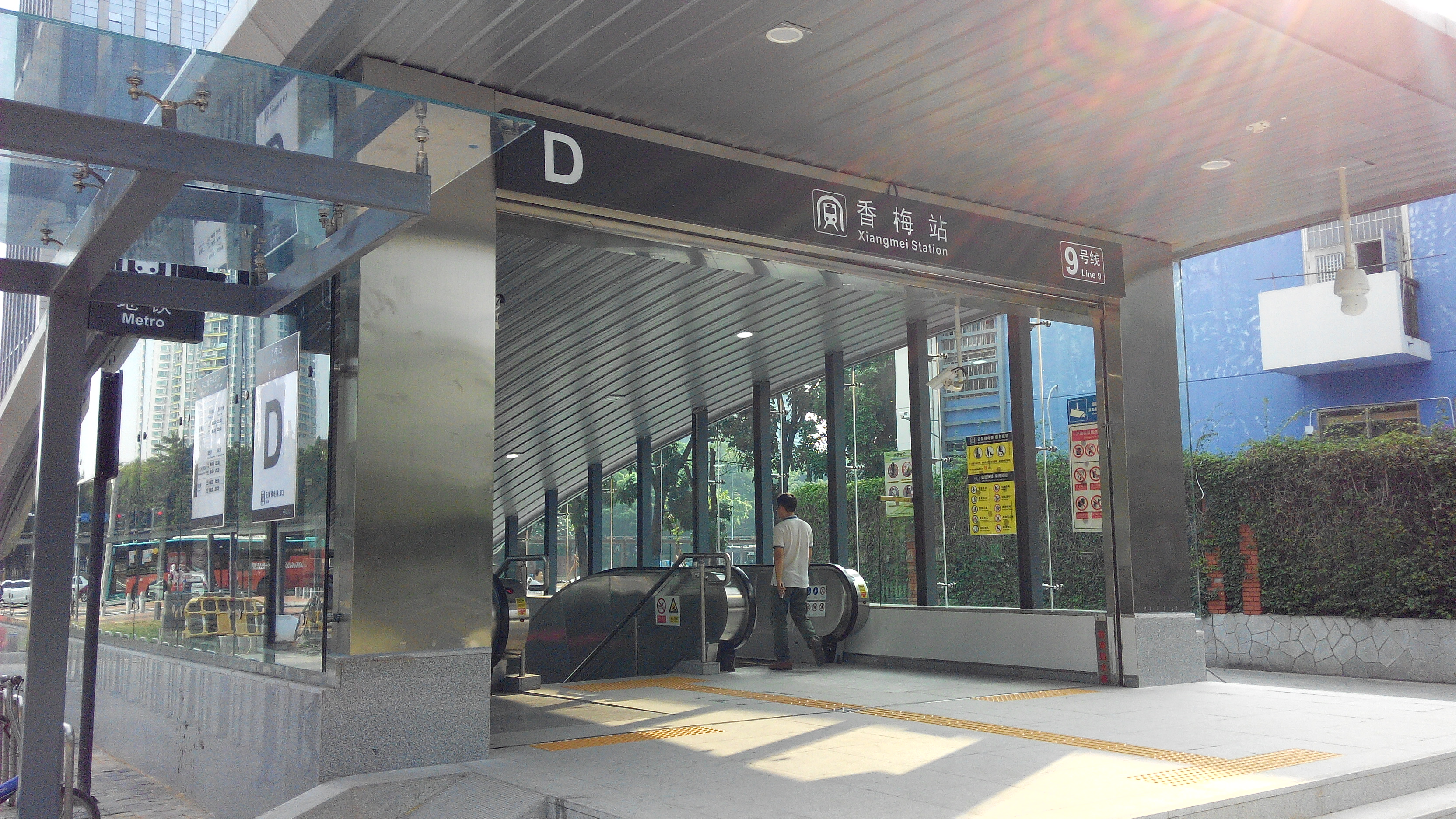 深圳地铁9号线 香梅站D出口